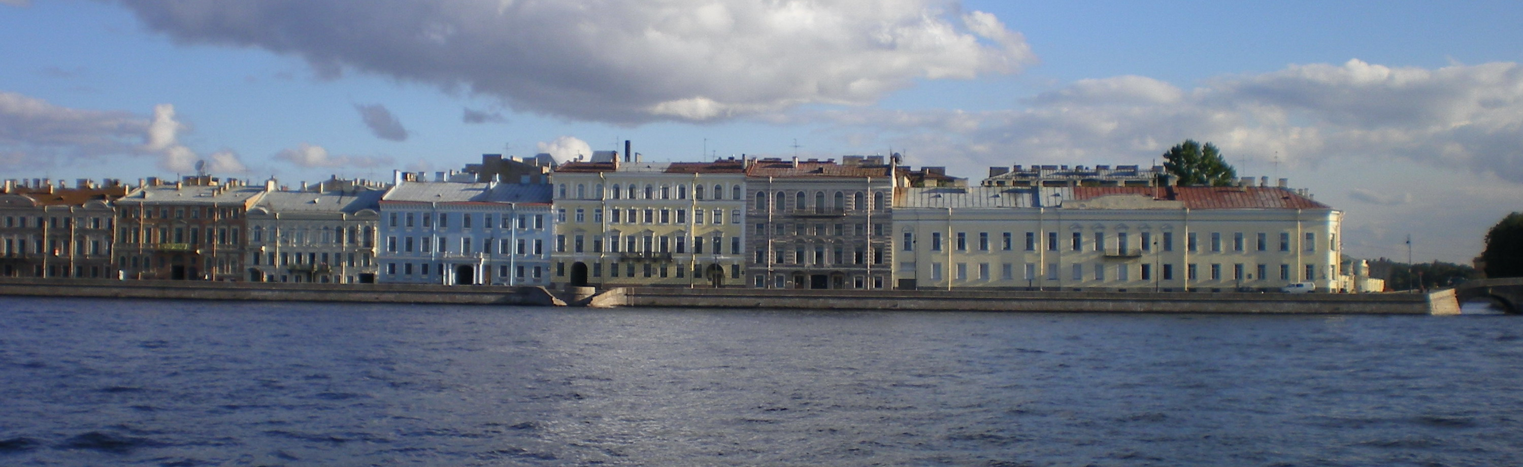 Набережная Кутузова дома 26-36, вид с Невы. Набережная реки Фонтанки.